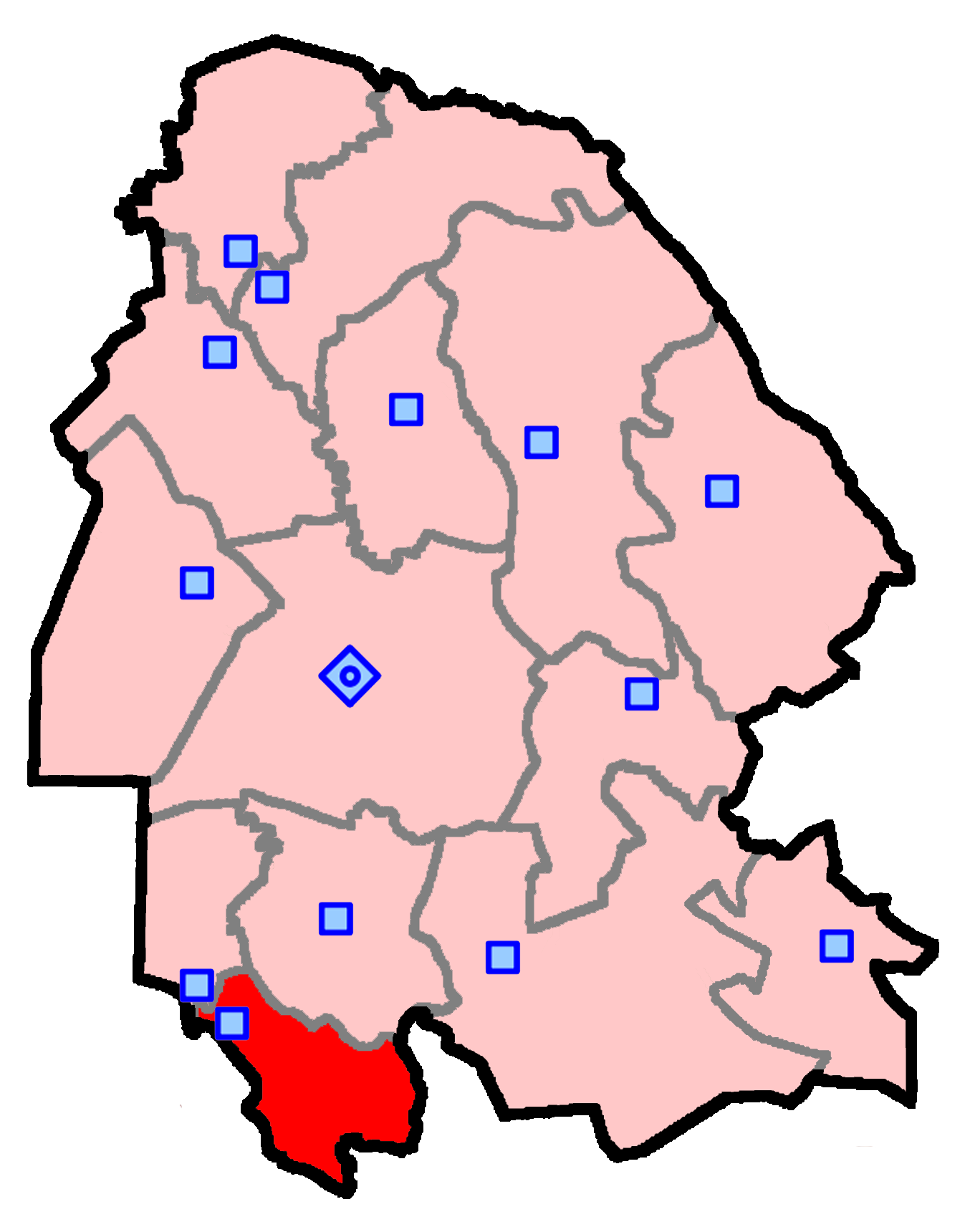 حوزهٔ انتخاباتی خرمشهر برای انتخابات مجلس شورای اسلامی